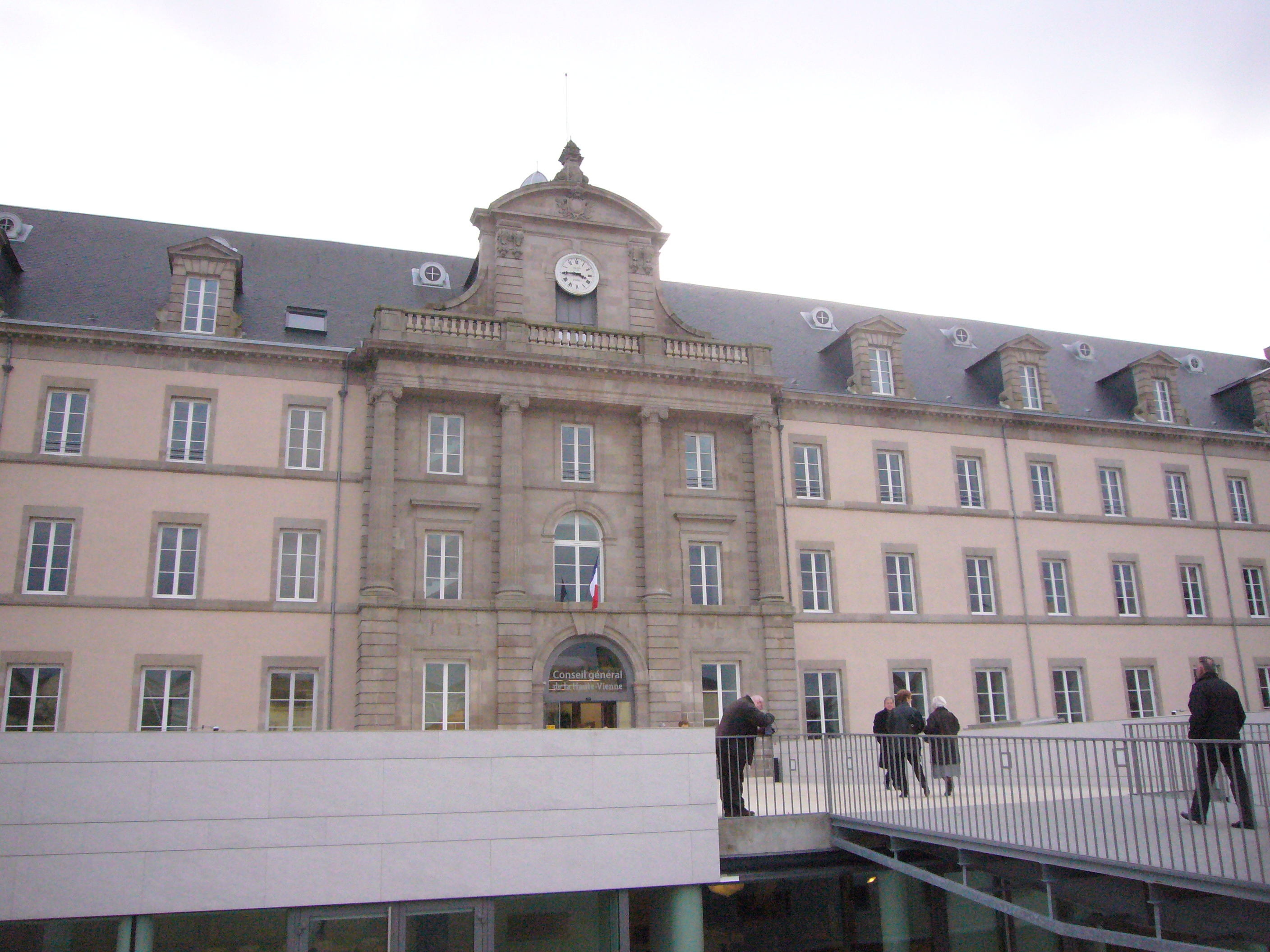 Ancienne caserne de la Visitation, Limoges, actuel siège du Conseil général de la Haute-Vienne.